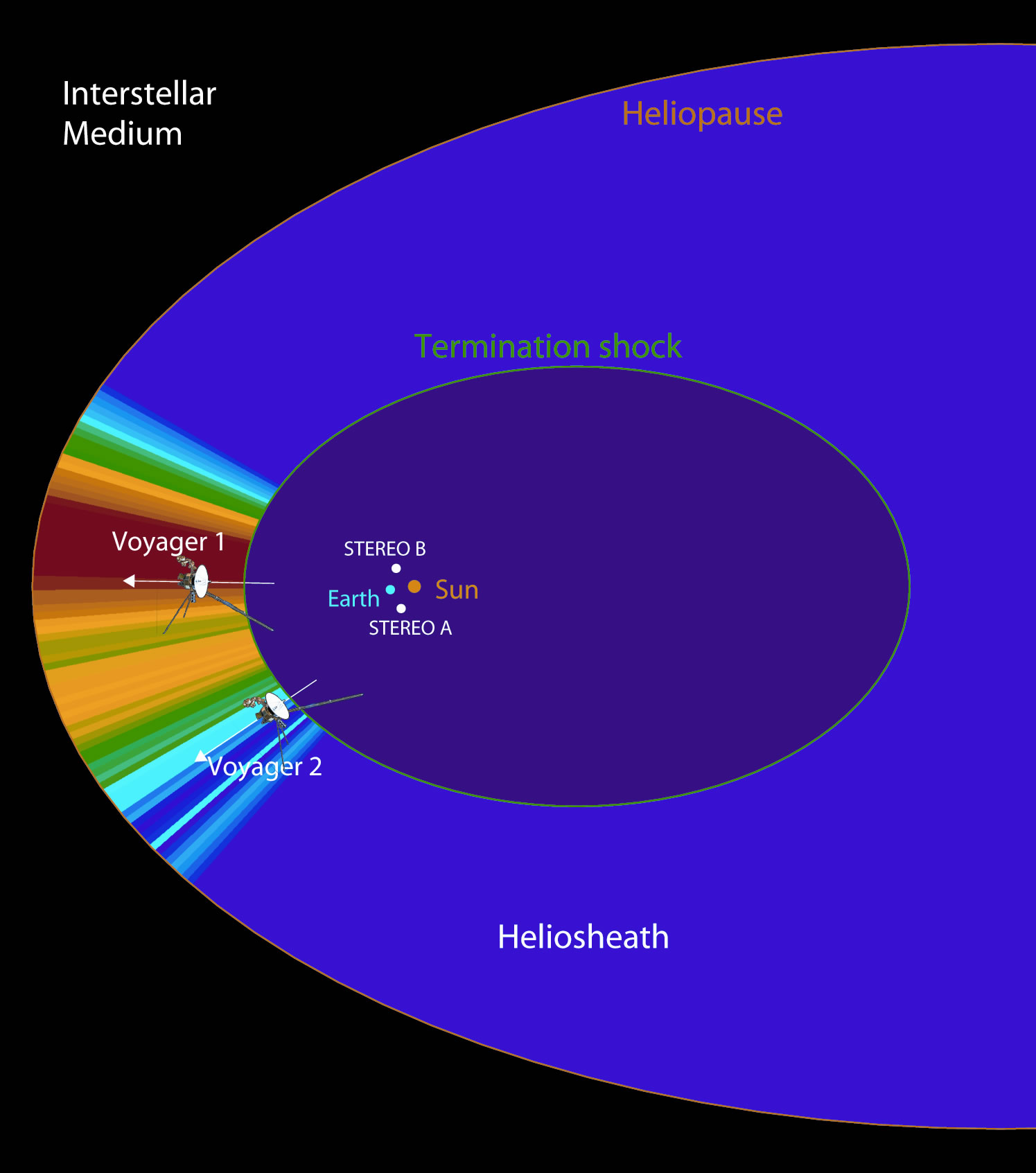 Schema zeigt die Heliosphäre mit den Bereichen Termination Shock, Heliosheath und Heliopause. Untersuchungen der STEREO-Raumsonden über die Ionen in der Heliosheath in Flugrichtung der Sonne sind eingezeichnet (siehe Quelle). Ebenfalls eingezeichnet sind aktuelle (2008) Positionen der Voyager-Raumsonden.